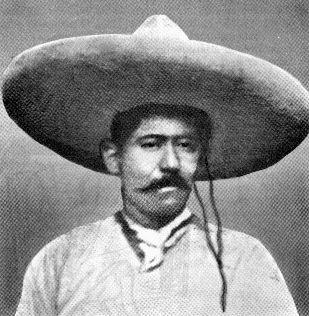 El general Zapatista Franco Pliego. Nació en Santa Cruz, distrito de Tlatelolco, Puebla. En 1911 se incorporó a las fuerzas maderistas del general Francisco Mendoza Palma. Al romper Emiliano Zapata con Francisco I. Madero se mantuvo fiel a la causa suriana, actitud que mantuvo en la guerra contra Victoriano Huerta. En 1914, participó en las tomas de Chilapa y Chilpancingo, en el estado de Guerrero, así como en las haciendas de Zacatepec y Treinta y en el Sitio y toma de Cuernavaca, Morelos.